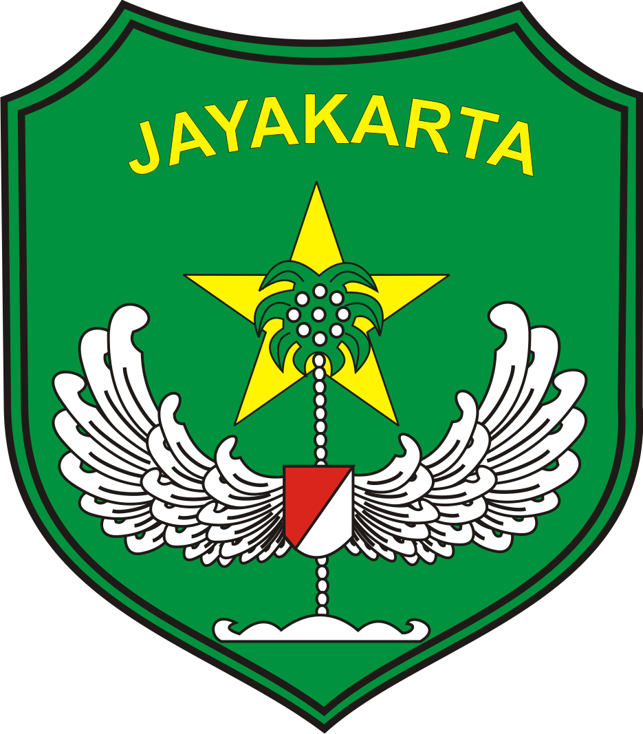 Gambar ini adalah Lambang Kodam Jaya